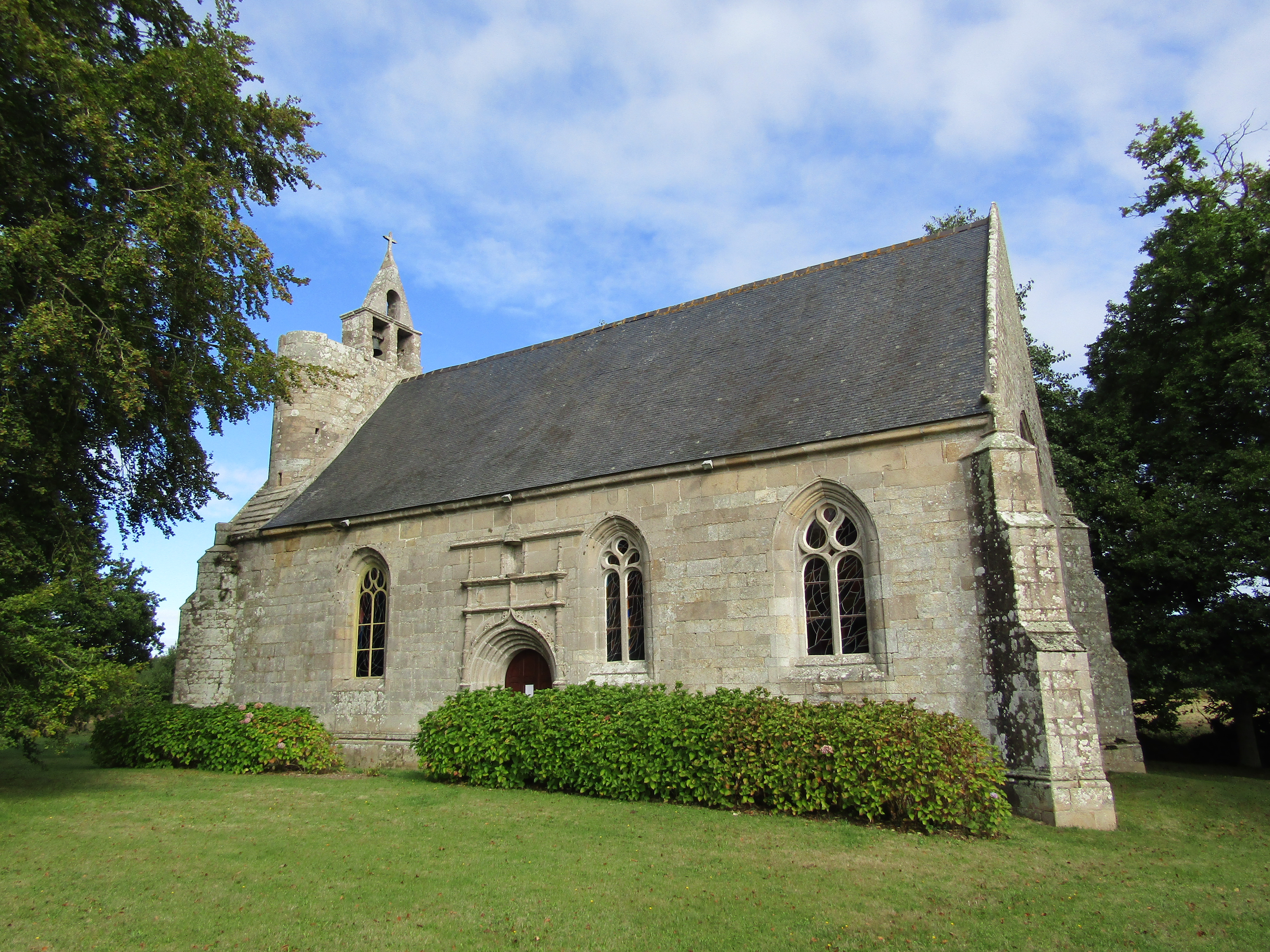 La Chapelle Notre-Dame de Clérin à Saint-Clet (Côtes-d'Armor)